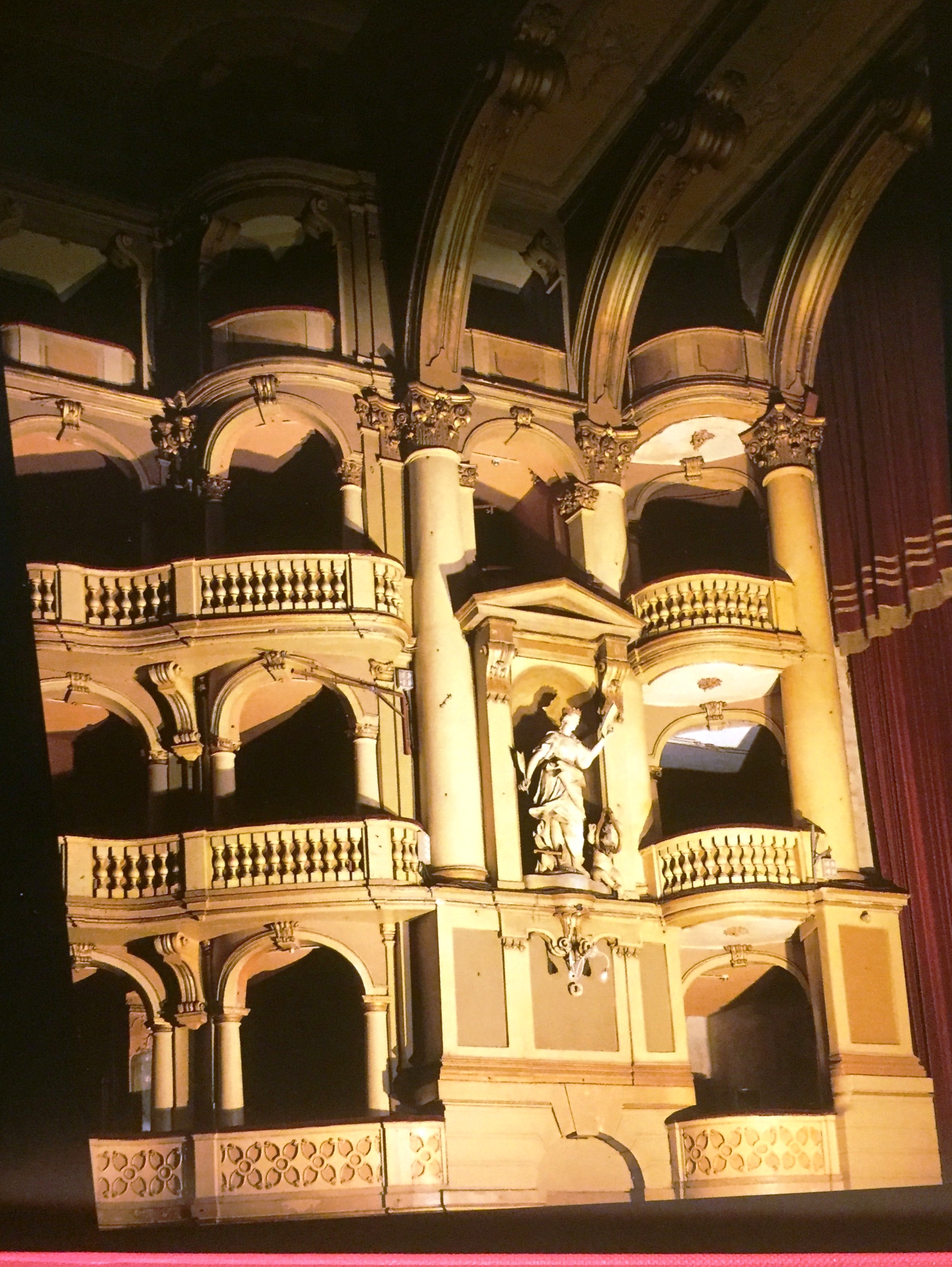 Interno del Teatro Fraschini